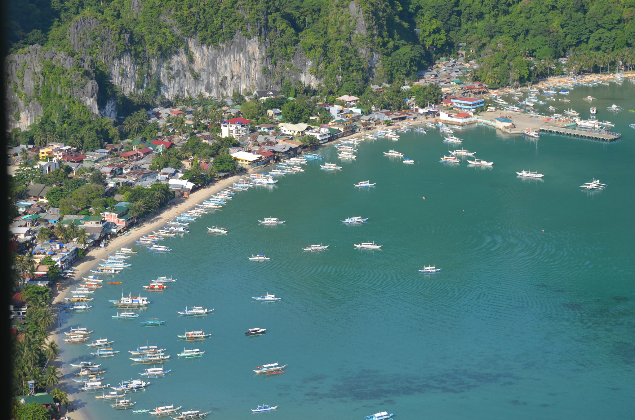 El Nido, Palawan, Philippines